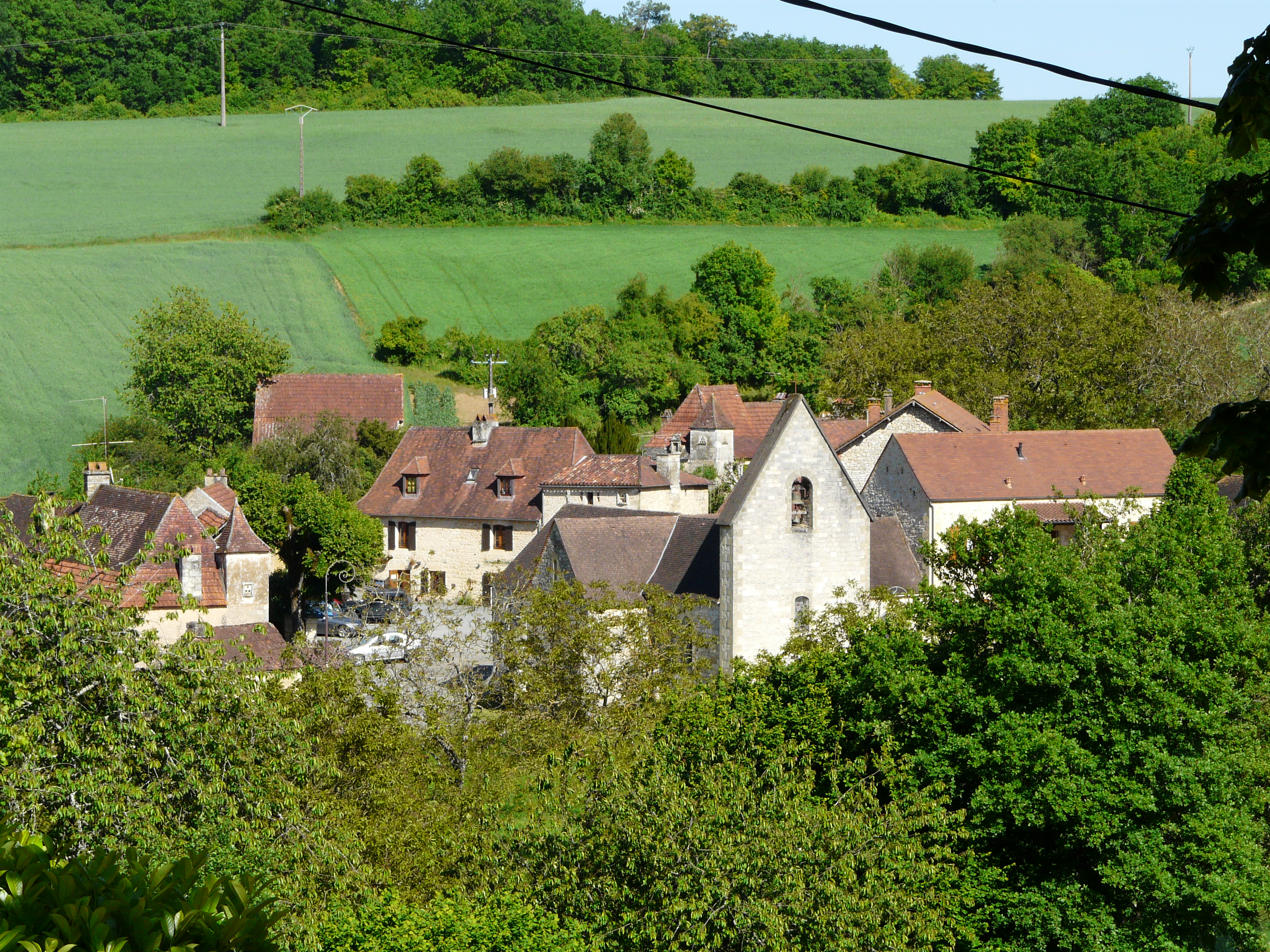 Le village de Veyrines-de-Domme, Dordogne, France.